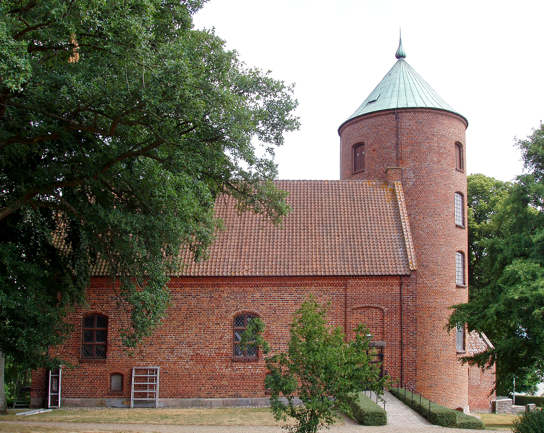 Skanderborg Slotskirke Skanderborg, Jylland, Danmark